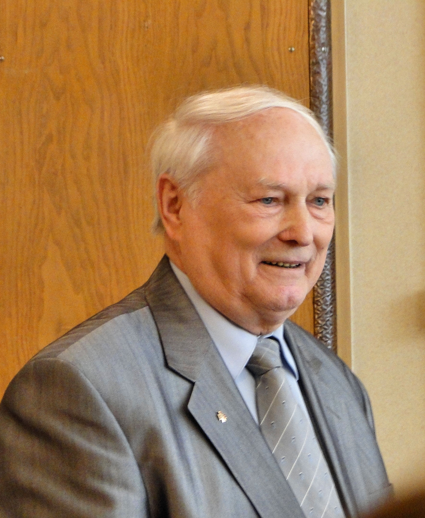 Stanisław Krzywicki - dyrektor w latach 1974-2003 Wojewódzkiej i Miejskiej Biblioteki Publicznej w Szczecinie (obecnie Książnica Pomorska)